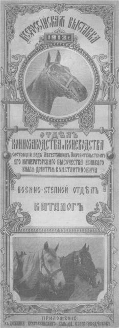 Всероссийская Конная Выставка в Царском Саду в Киеве. 1913 г.